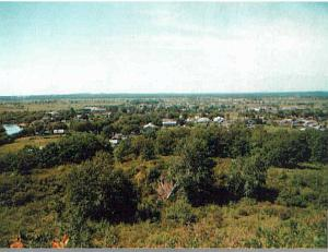 Вид на Сальское с Сальской сопки